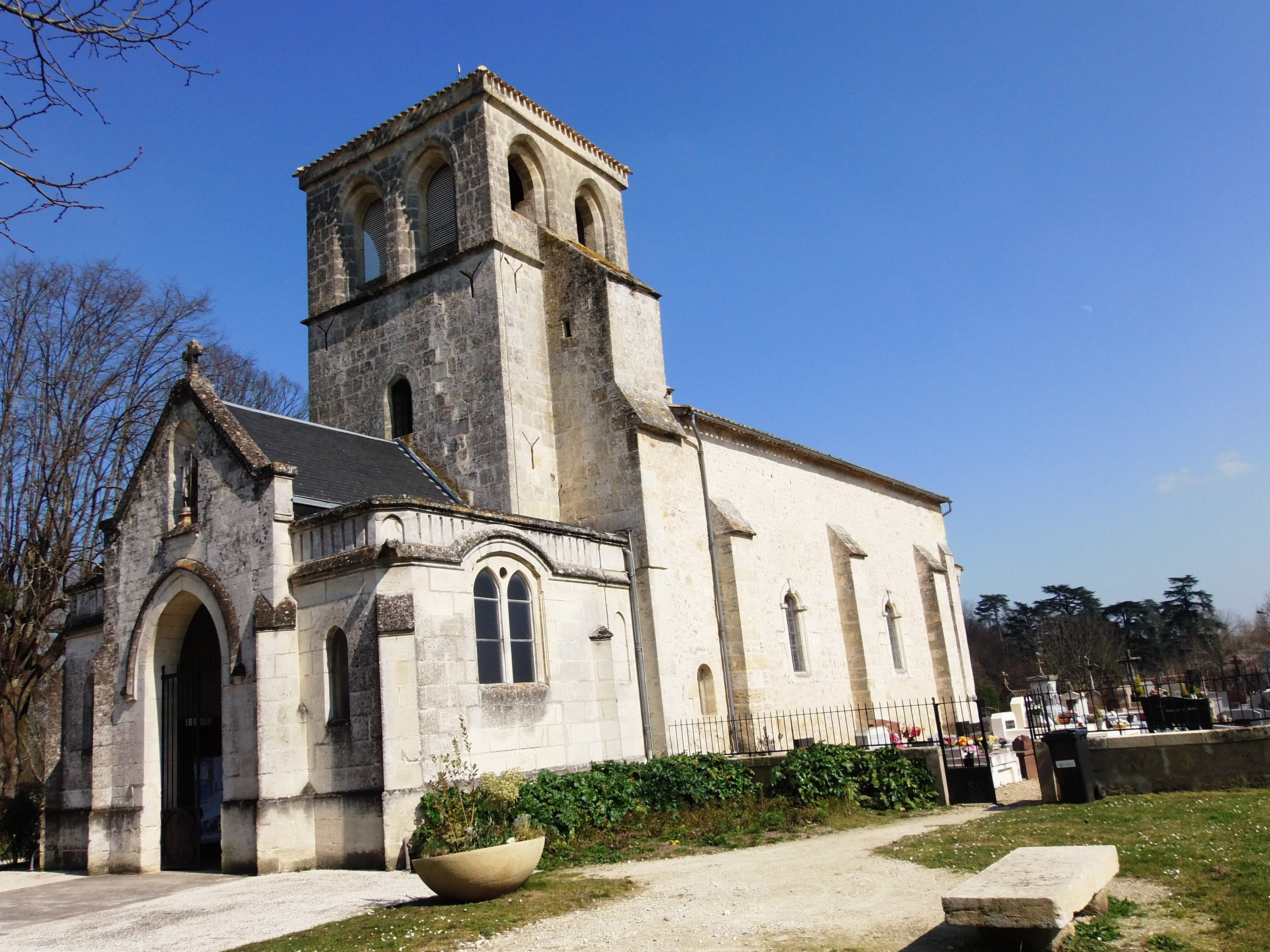 Église Saint-Seurin d'Artigues-près-Bordeaux (Gironde, France). Édifice des XIIe et XVIIe siècles, église romane, clocher gothique.